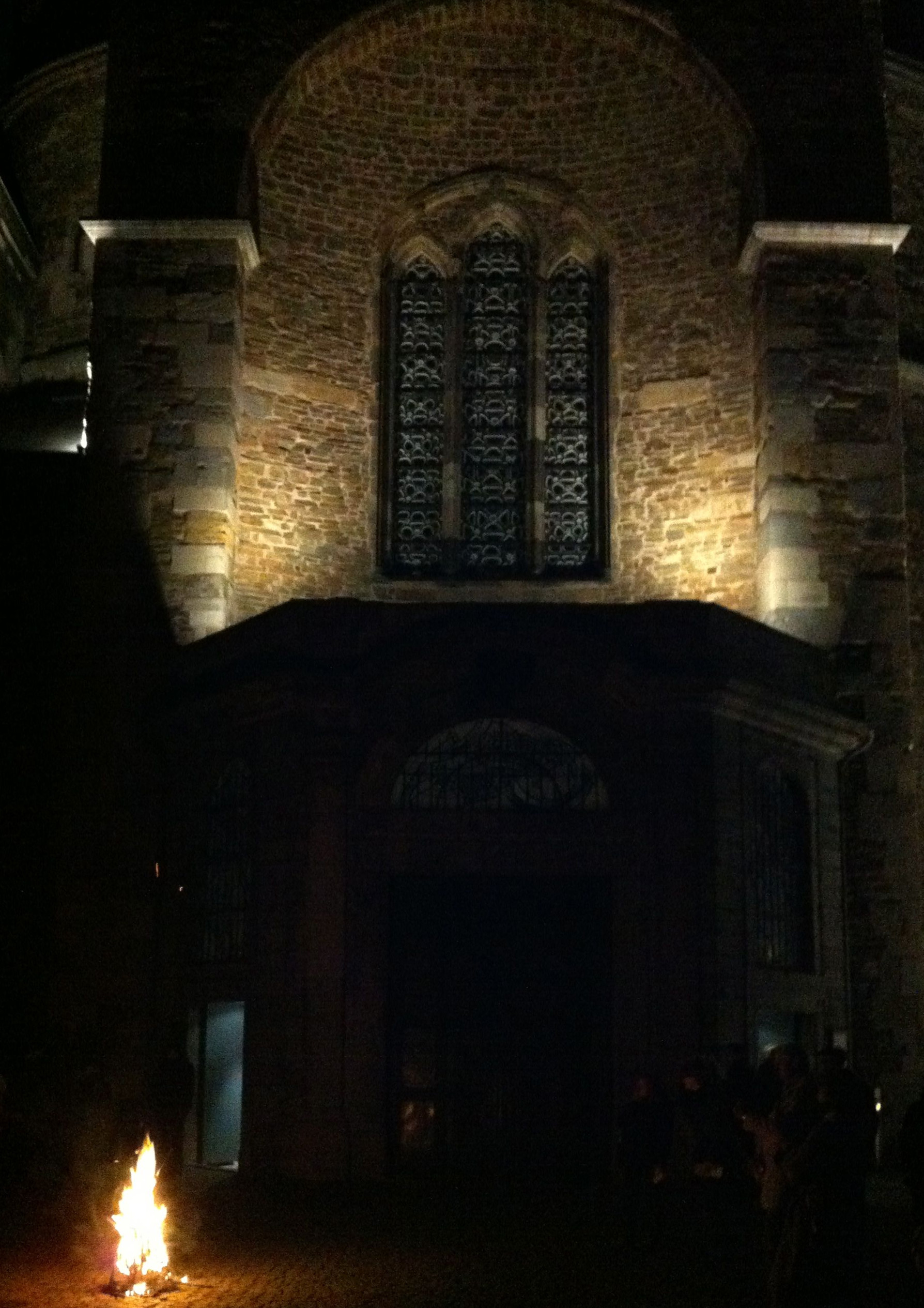 Osterfeuer im Domhof des Aachener Domes, 2012